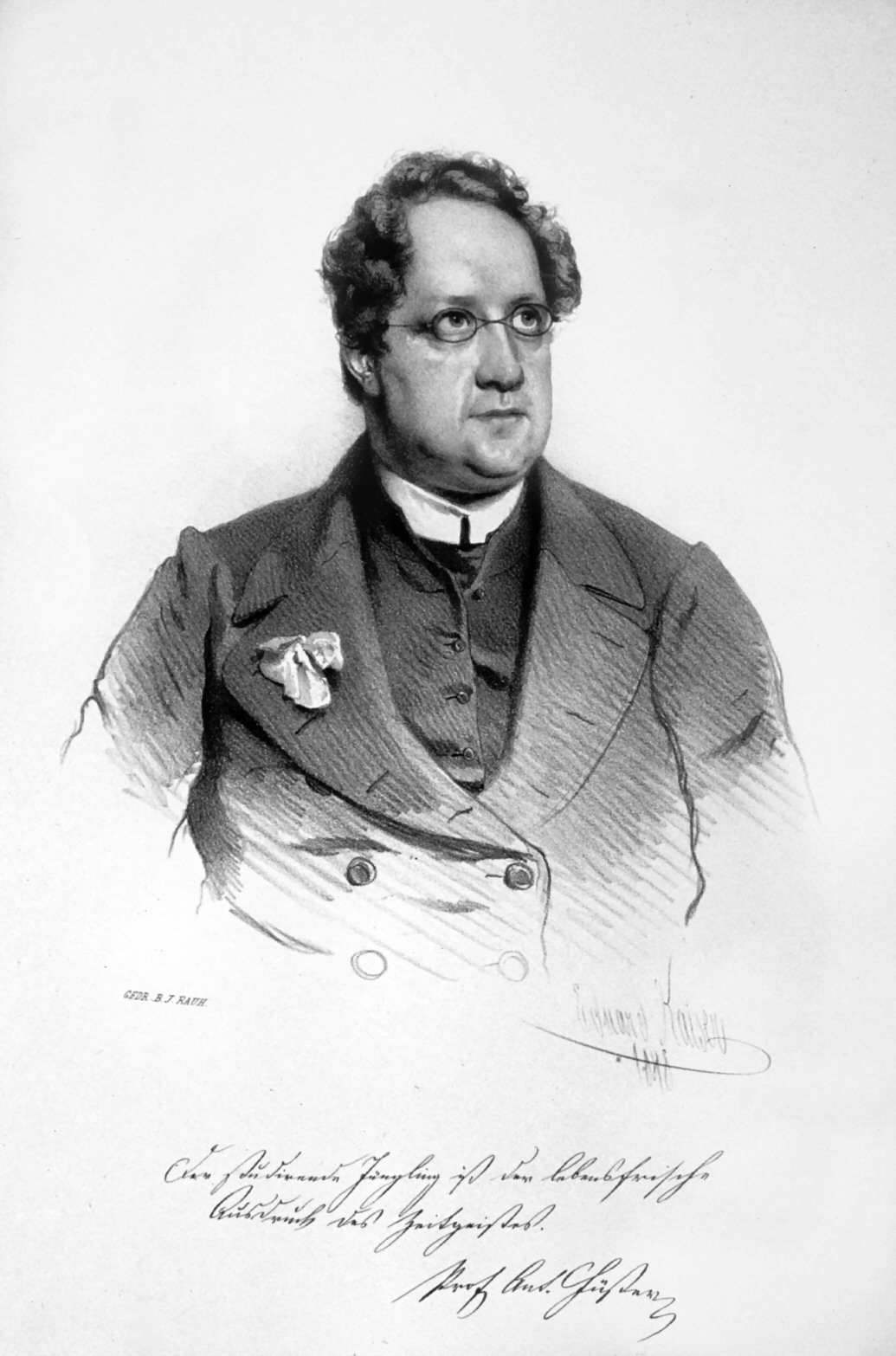 Anton Füster (1808-1881), katholischer Priester, Aktivist in der Revolution 1848. Seelsorger der Akademischen Legion. Lithographie von Eduard Kaiser,1848